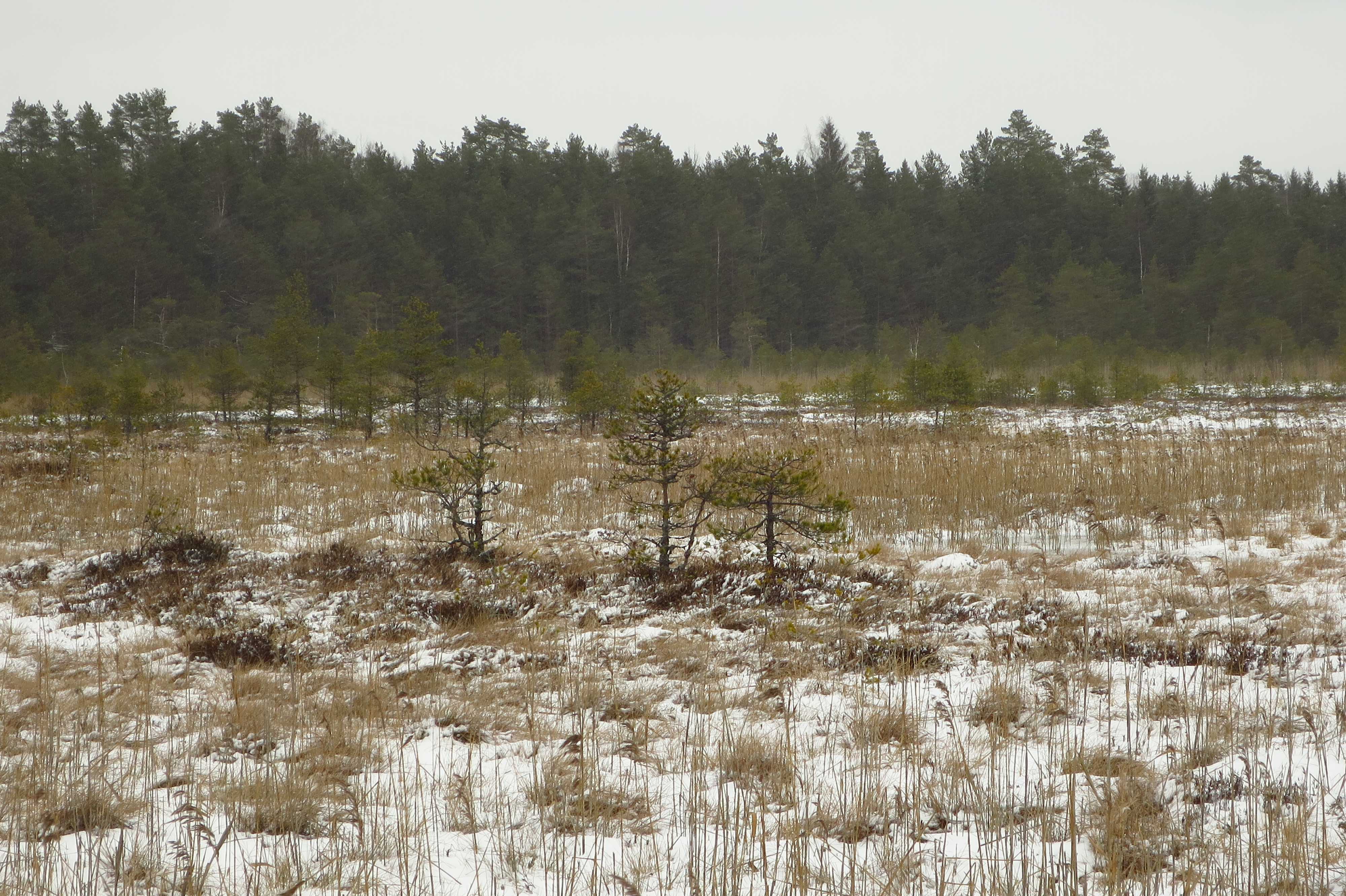 Orkjärve looduskaitseala